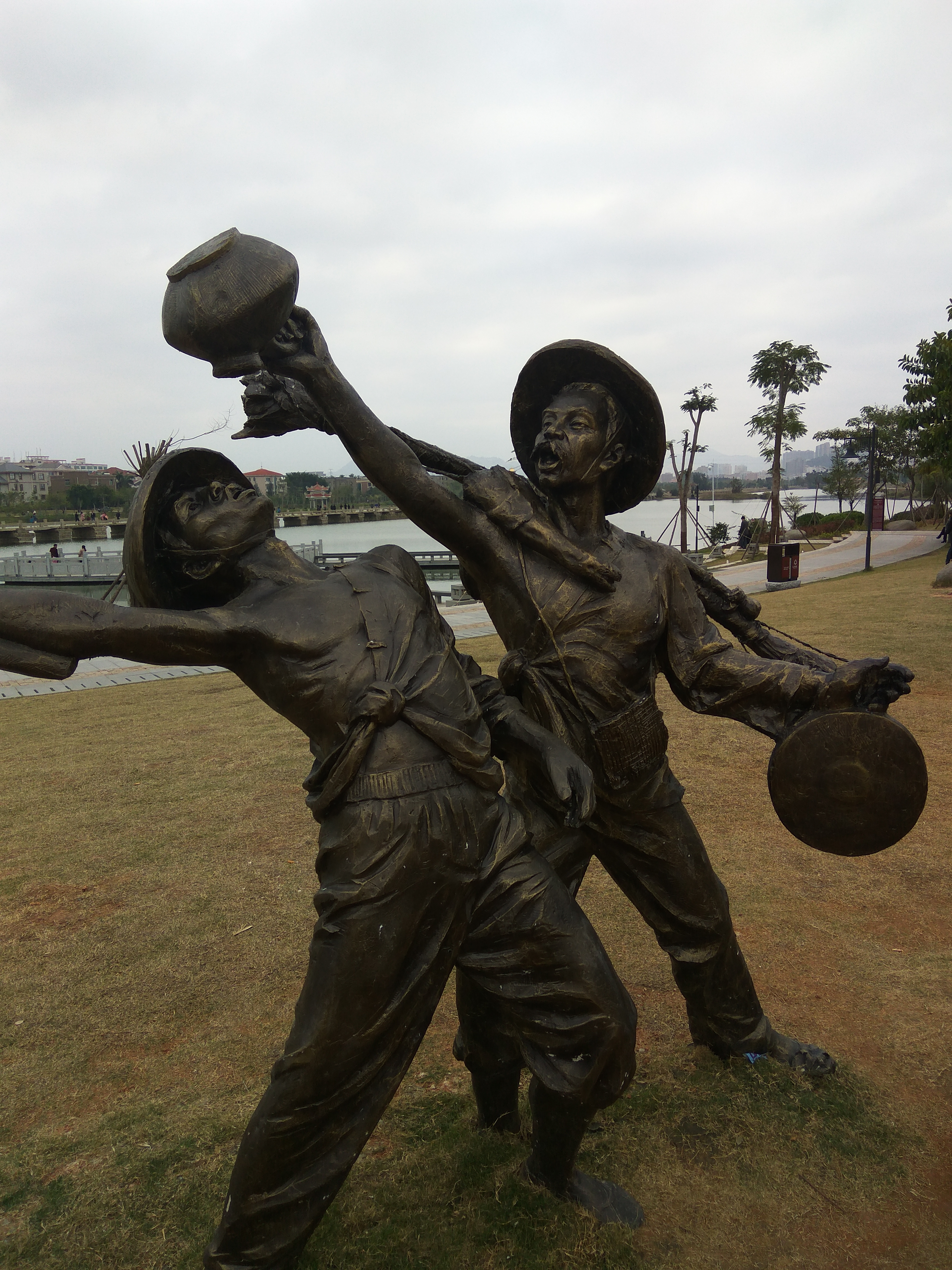 安平桥公园嗦啰莲雕塑